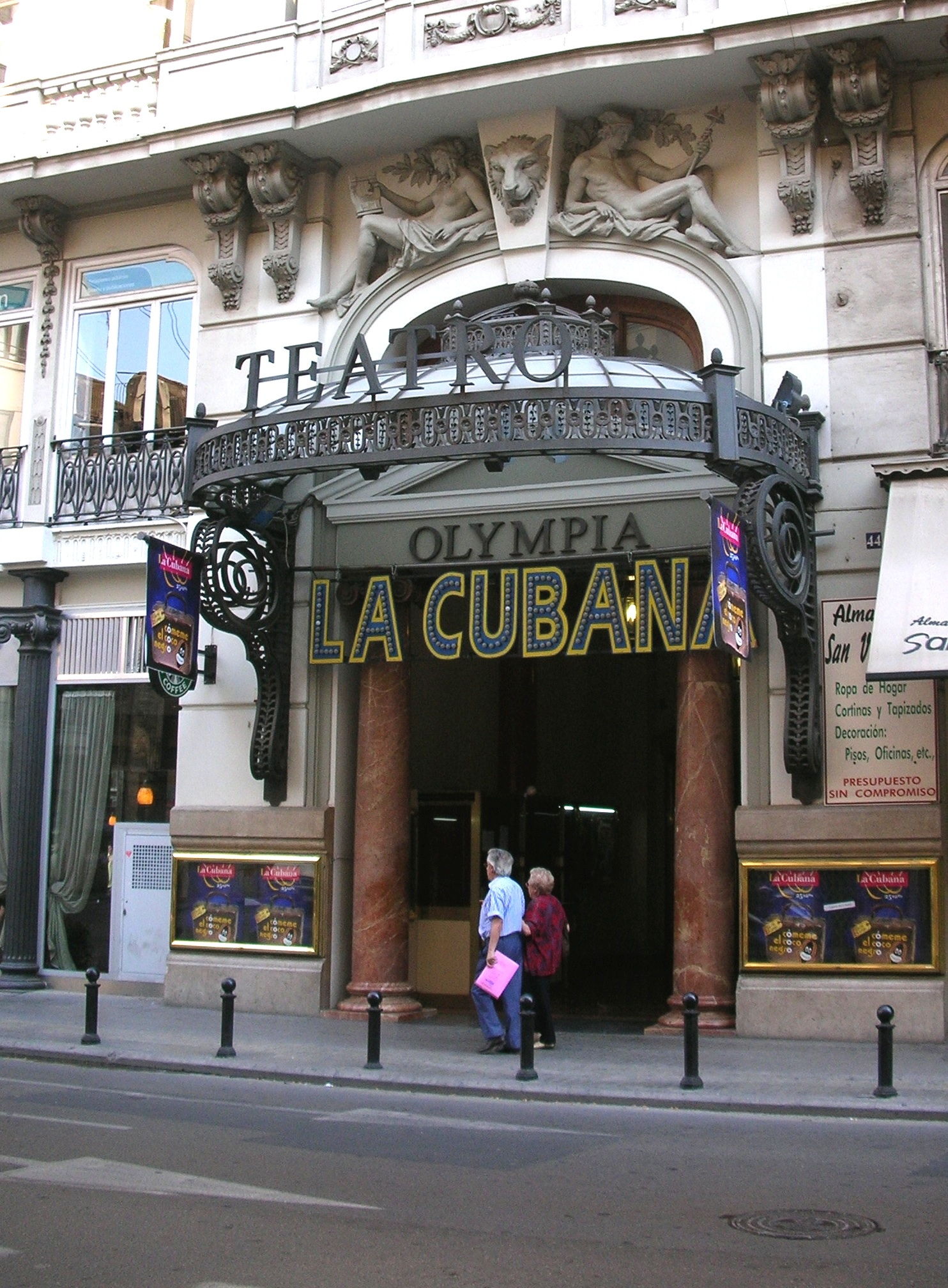 Porta d'entrada del teatre Olympia (València), amb cartells anunciant la representació d'una obra per la companyia La Cubana